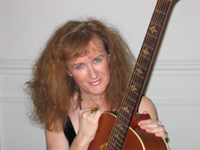 Rosena Horan